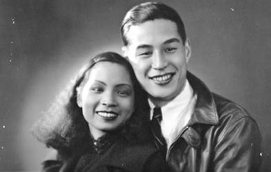 王人美和金焰